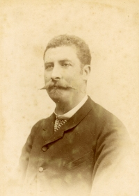 Paul Marmy, Nantes, 1886 (Louis Martin photographe)